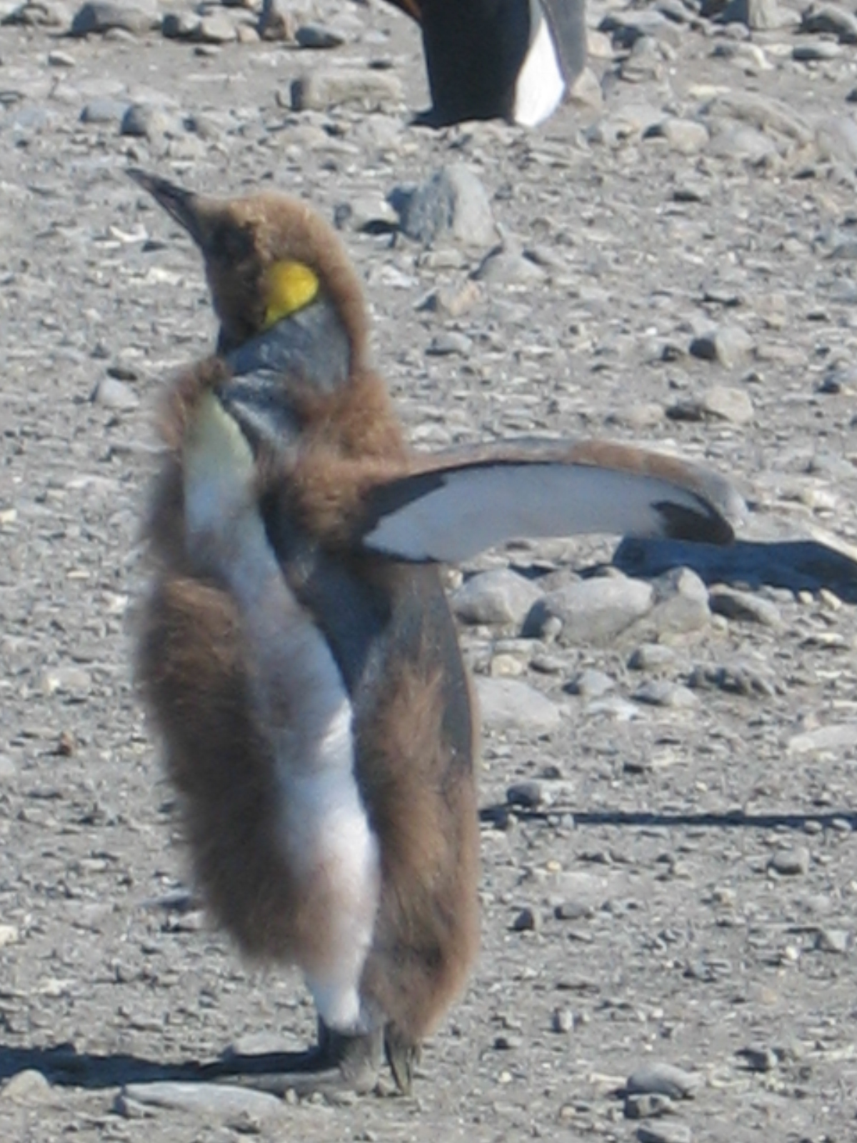 juvenile Aptenodytes patagonicus moulting to his first adult appearance / Beschreibung: junger Aptenodytes patagonicus, der gerade sein Jugendgefieder verliert